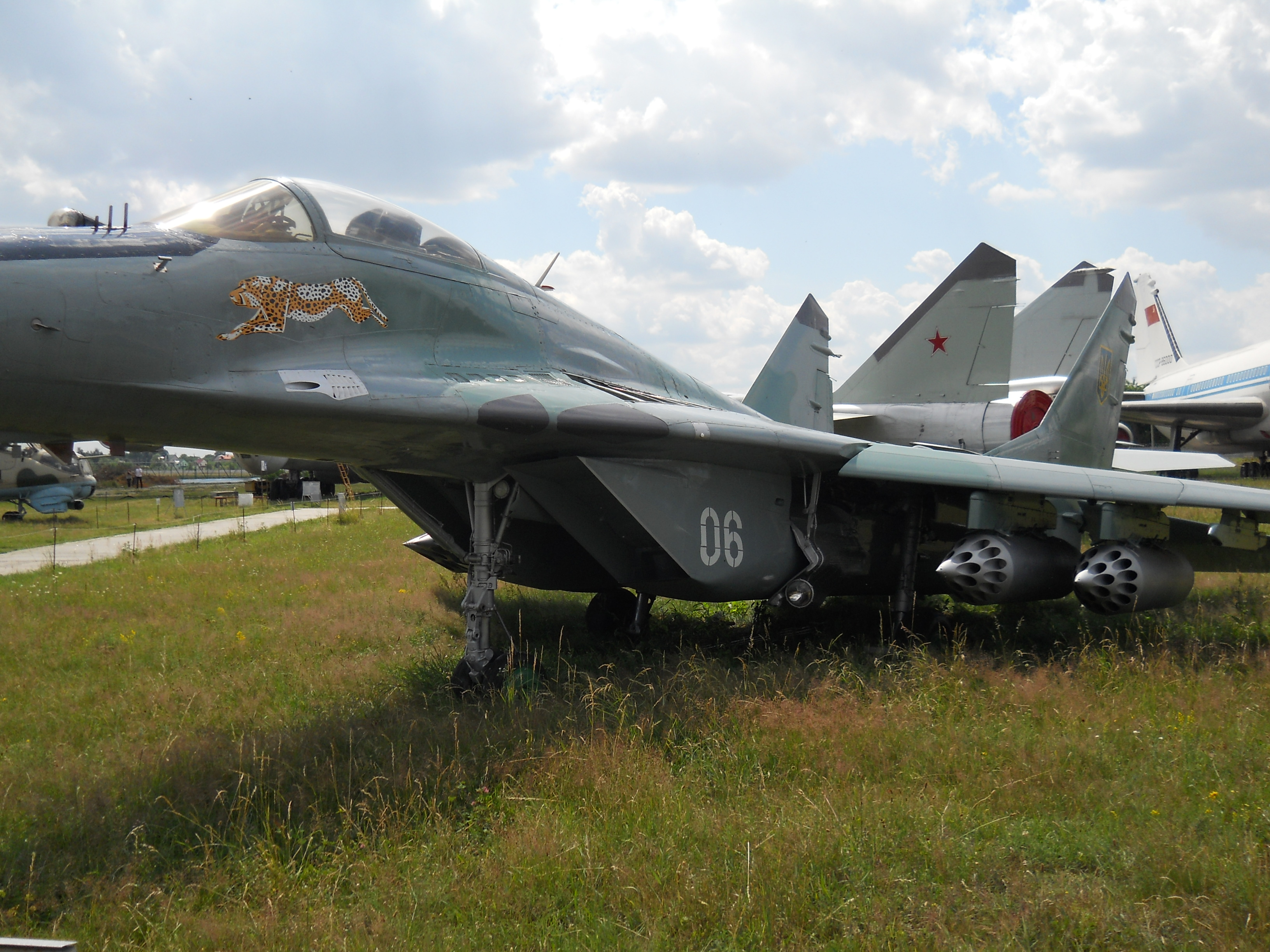 kiev ukraine 1076 state aviation museum zhulyany (37)